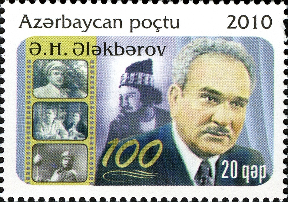 Azeri postage stamp